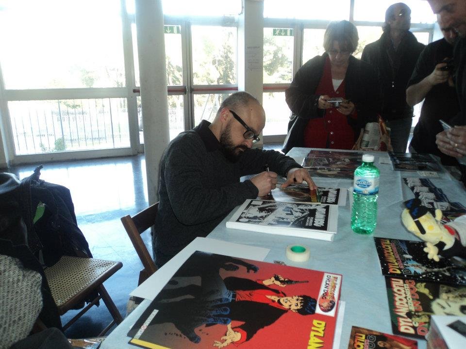 Leomacs al Roma Comics & Games 2012